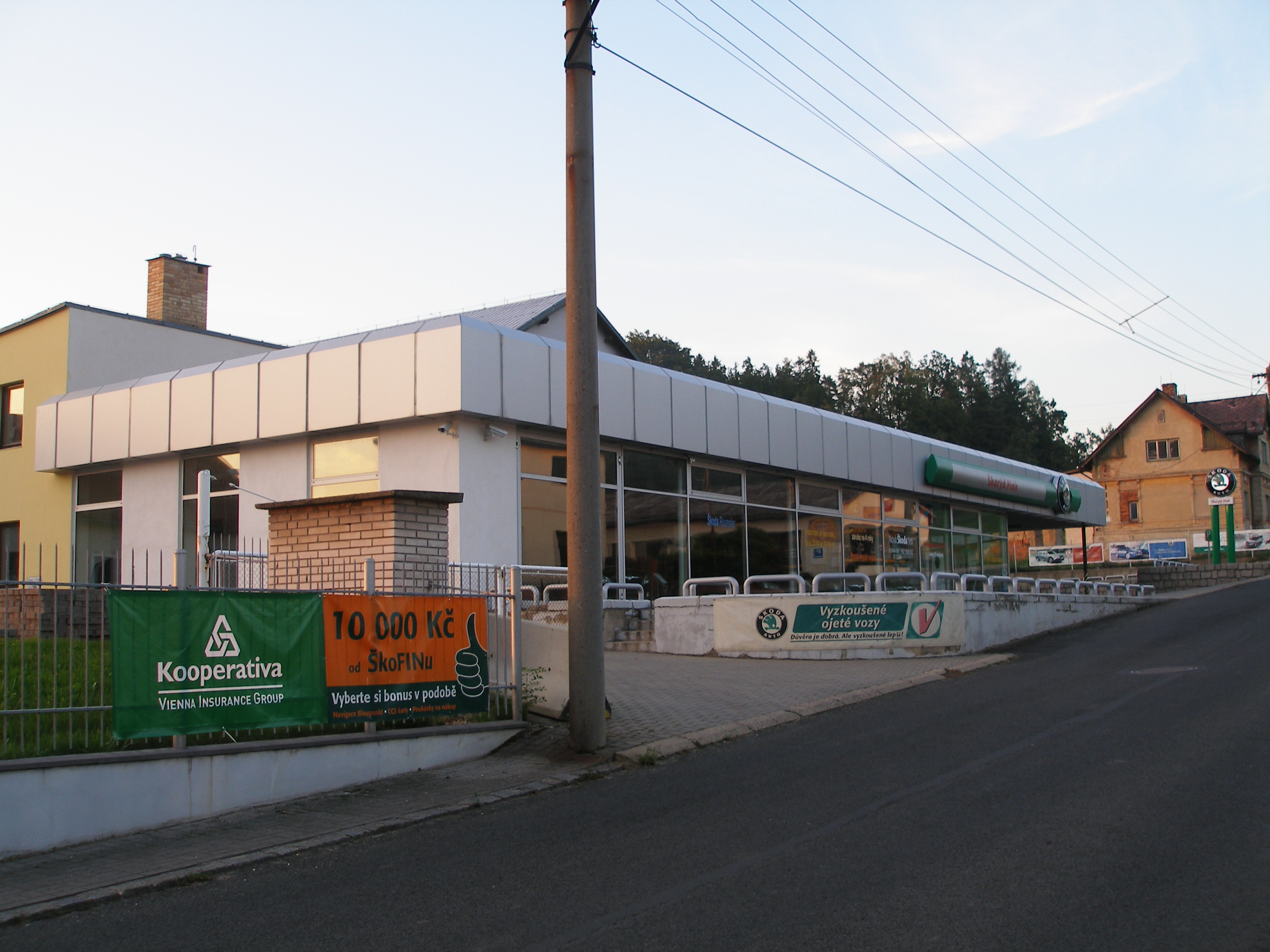 Pohled od jihu na hejnický autosalon firmy Ladislav Škarýd - Pink nabízející vozy značky Škoda.